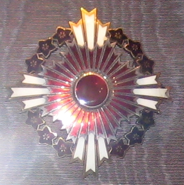 Звезда ордена восходящего солнца с цветами павлонии